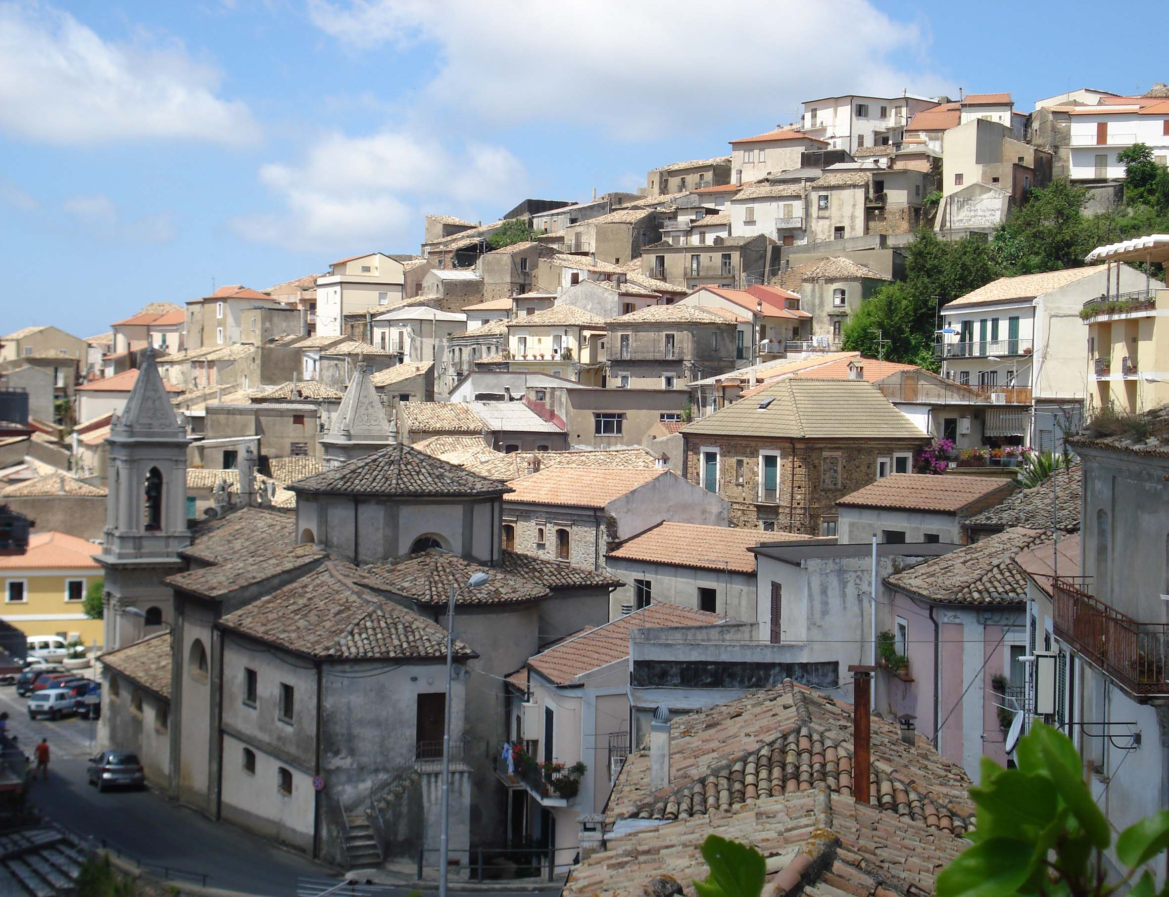 Curinga vista dal rione Ospizio.